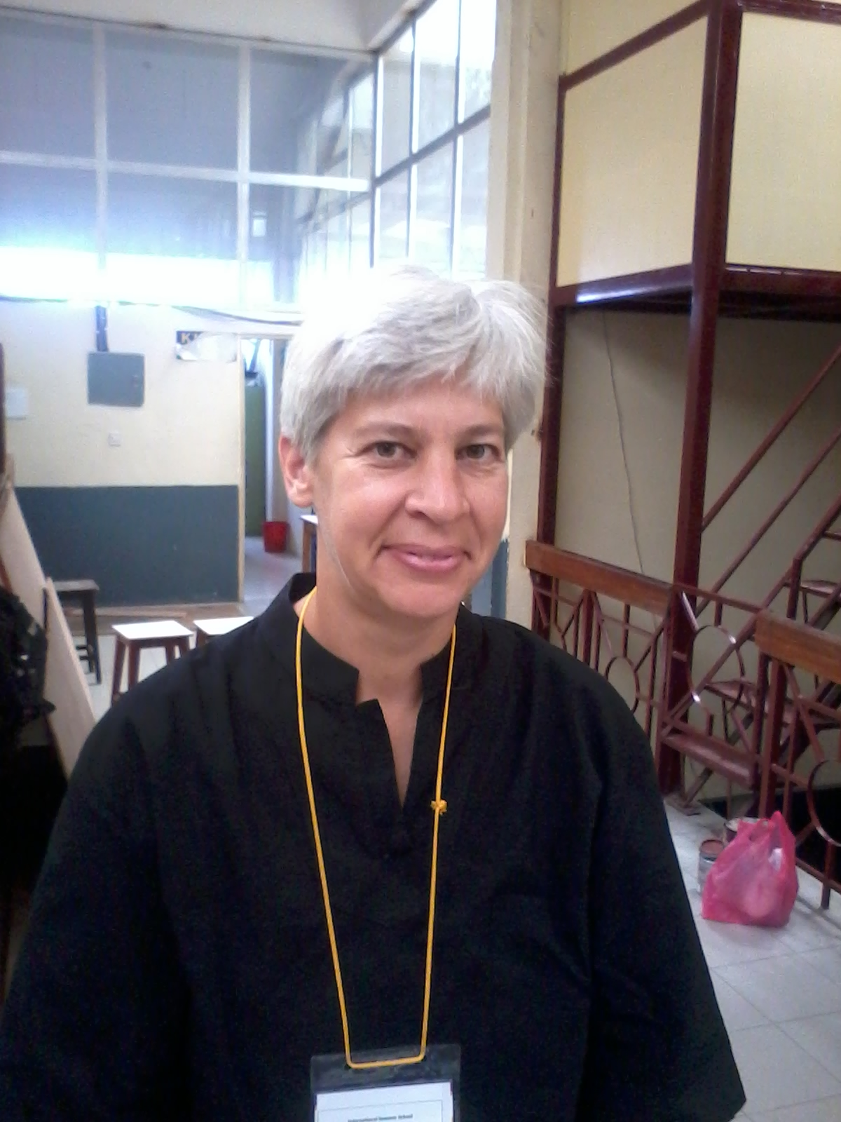 नेपाली: प्रोफेसर मिरियम बट्ट काठमाण्डौं विश्वविद्यालयमा